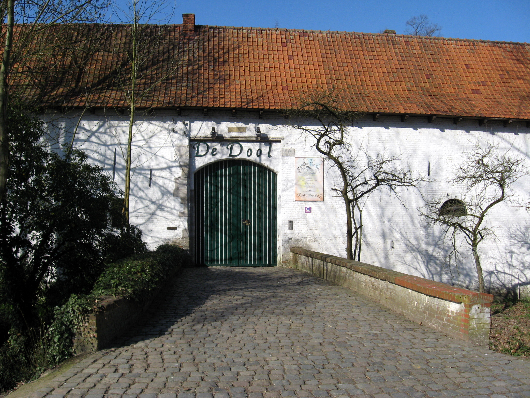 Hoeve van Kasteel Ter Dolen in Helchteren